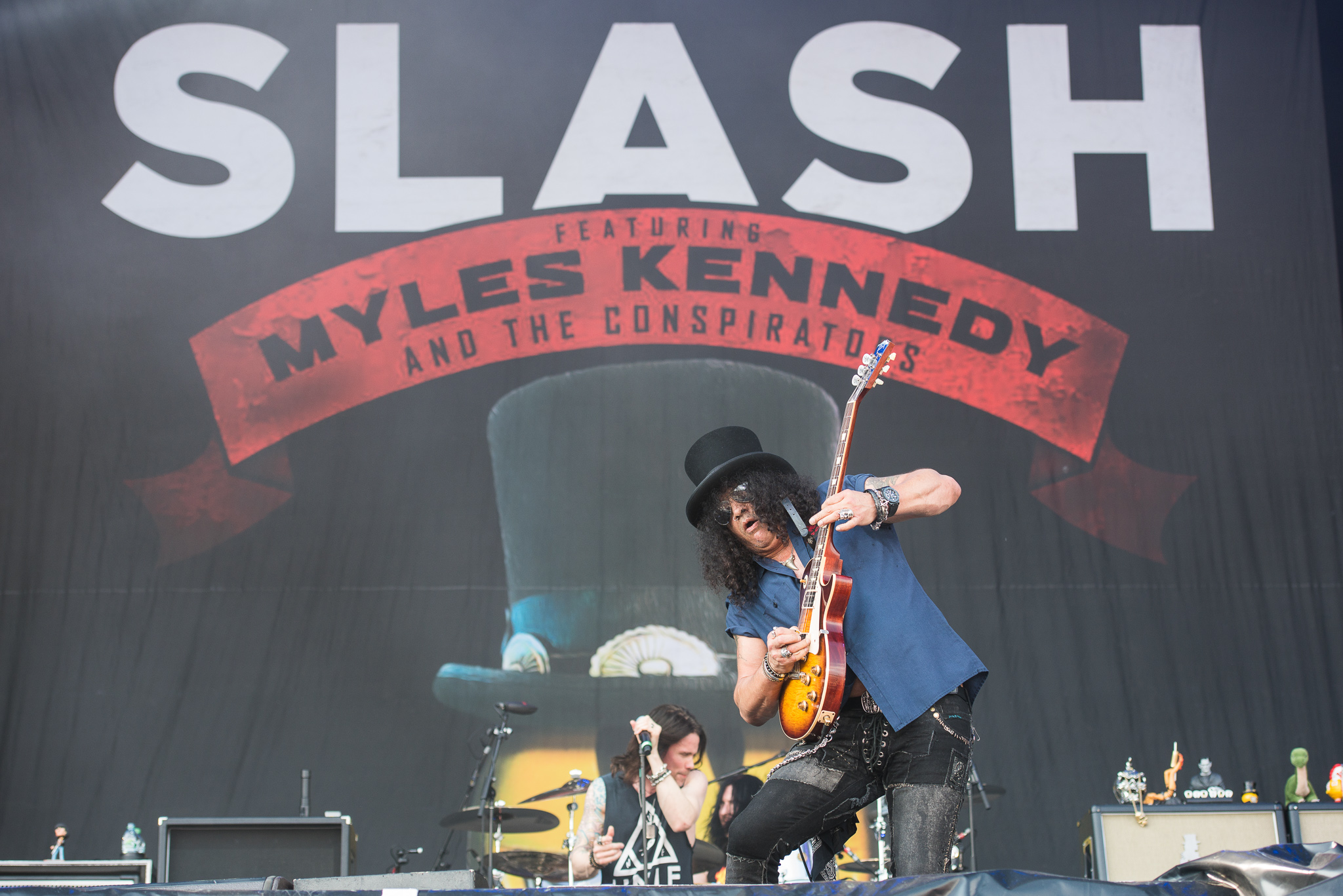 ARGO-Konzerte,Festival,Konzert,Livekonzert,Livemusik,Musik,RiP,Rock im Park 2015,Saul Hudson,Seat Zeppelin Stage,Slash feat. Myles Kennedy & The Conspirators